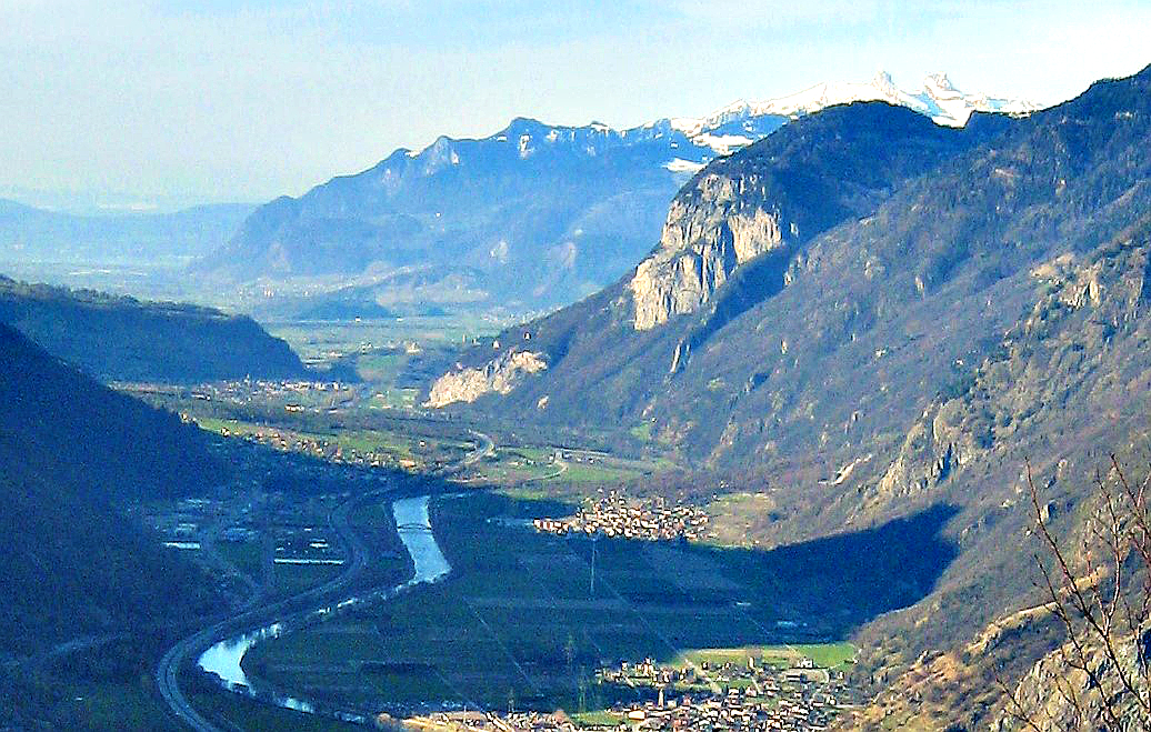 Aiguille de Dailly, Chablais VS, Schweiz